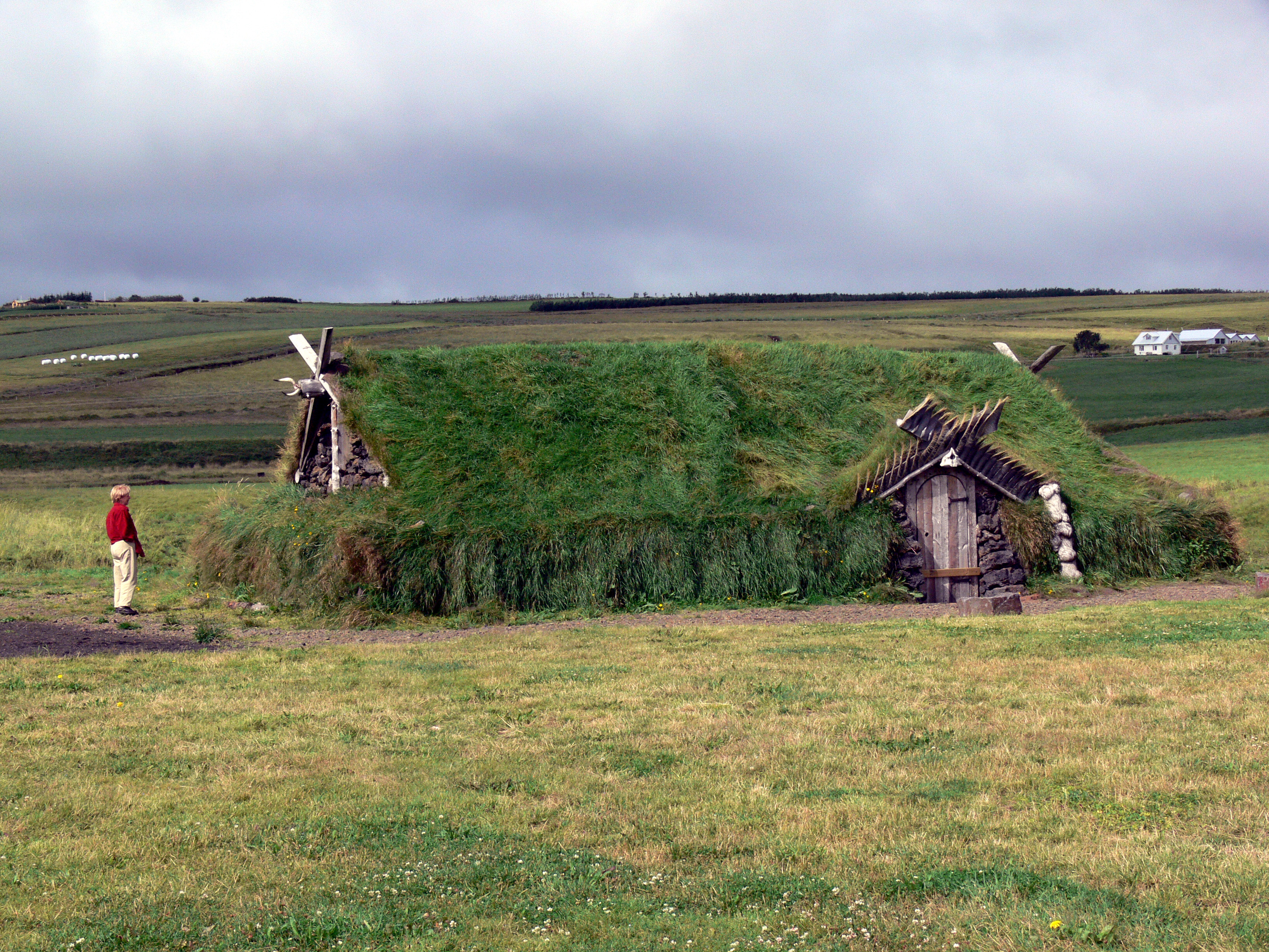 Meyjarhof (= Frauenhaus) beim Café Langbrók in Fljótshlíð aus Stein und Torf; rekonstruiert. So sollen die ersten provisorischen Gebäude der Siedler gewesen sein, wo die Frauen wohnten, während der eigentliche Hof gebaut wurde.